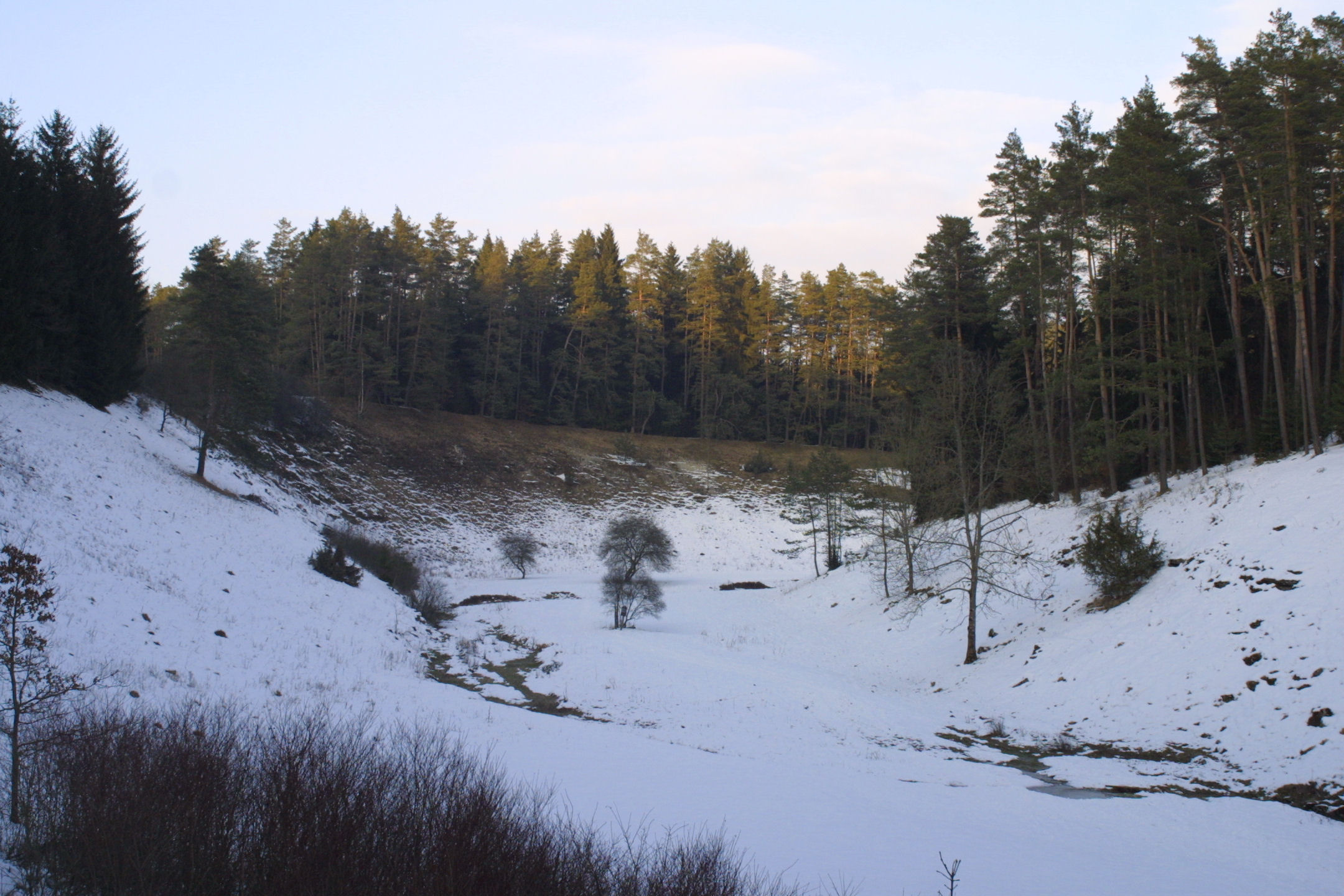 valley near Oberleinleiter (Franconia)